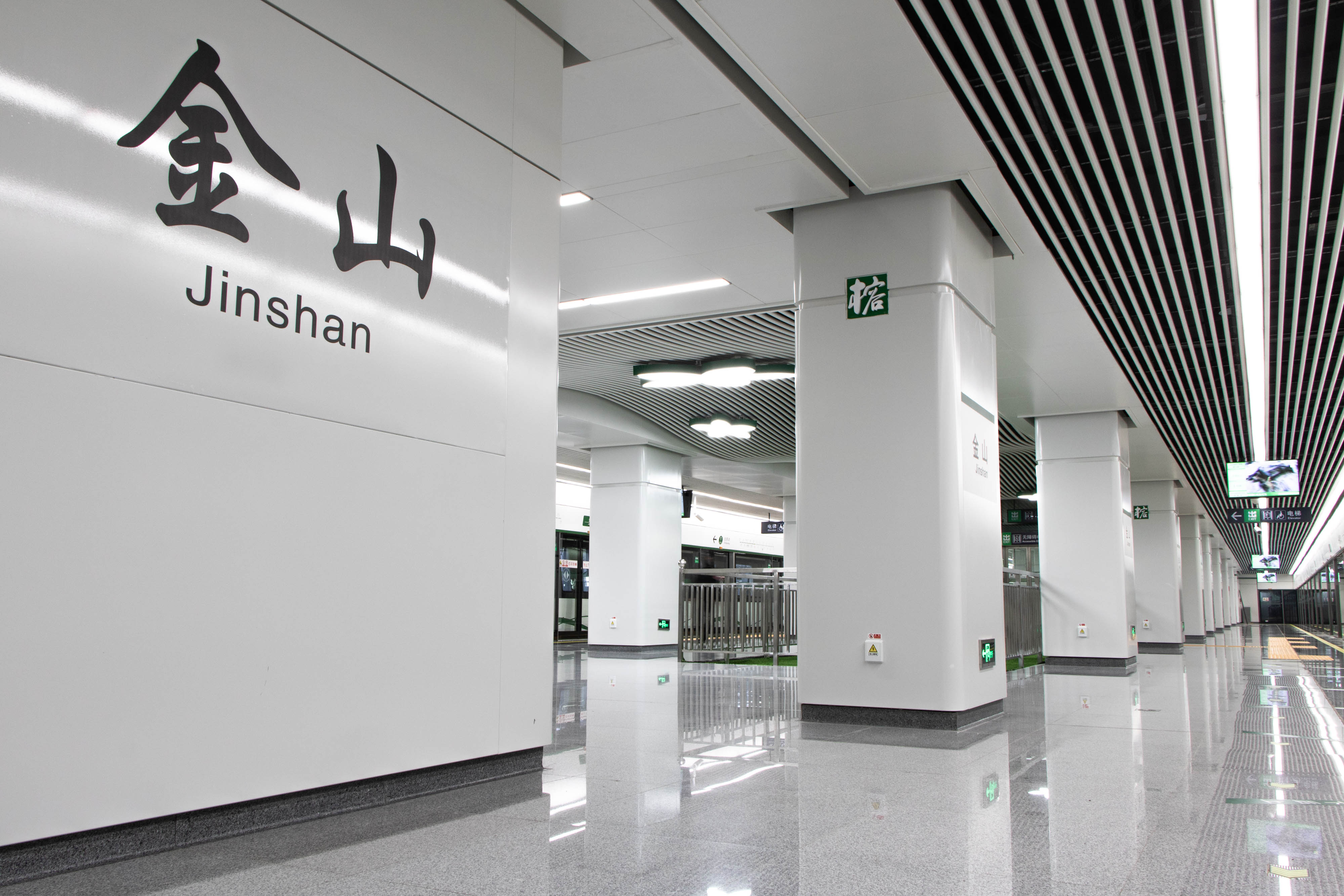 中文（中国大陆）: 福州地铁2号线金山站